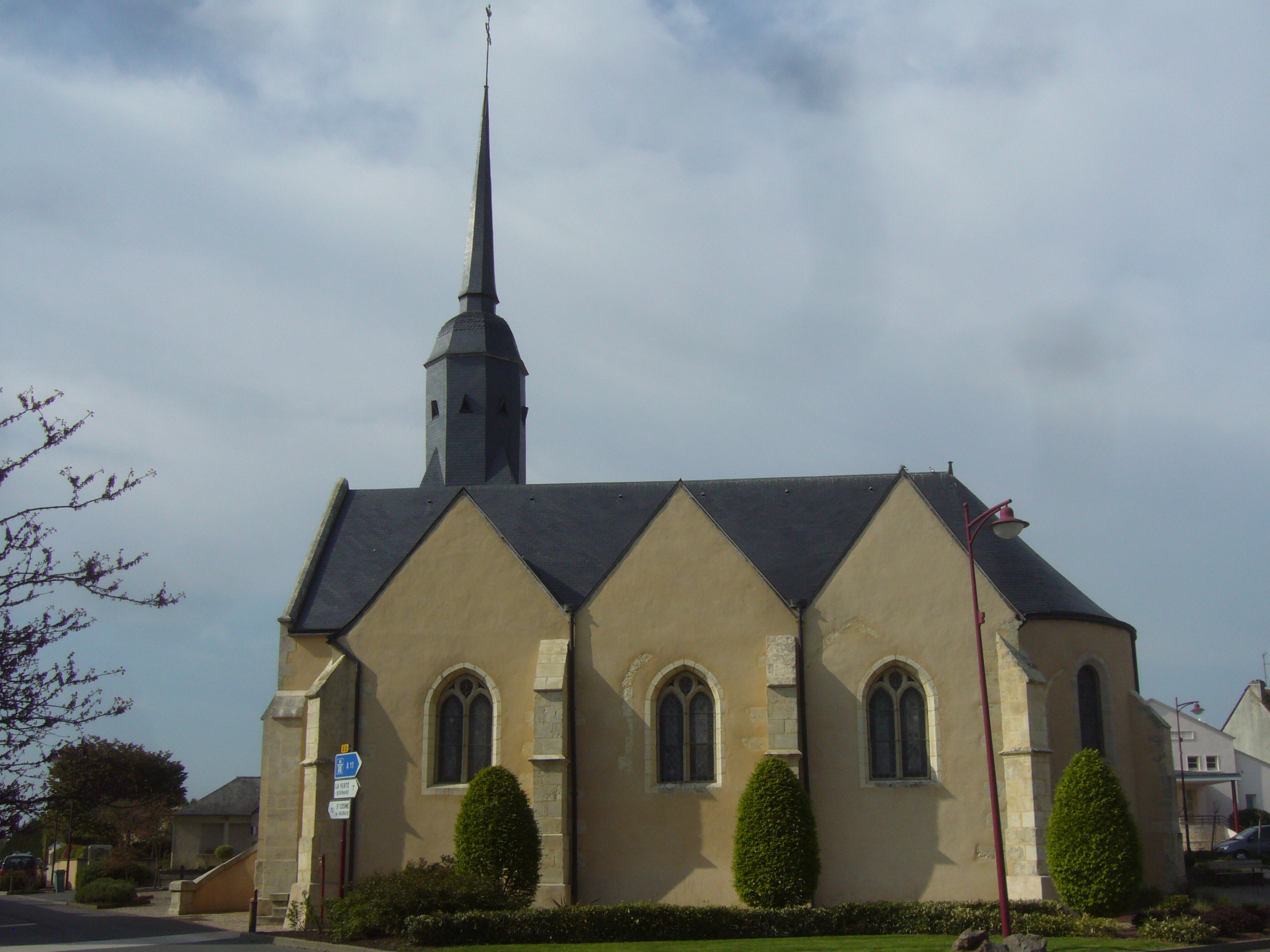 Église Sainte-Marie-Madeleine de La Chapelle-du-Bois, dans la Sarthe .